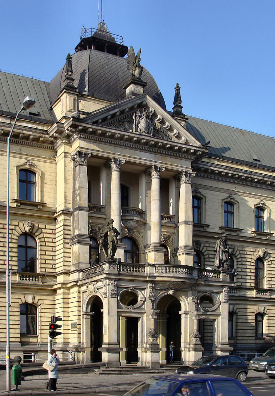 Pałac Ziemstwa Pomorskiego w Szczecinie (al. Niepodległości 40)